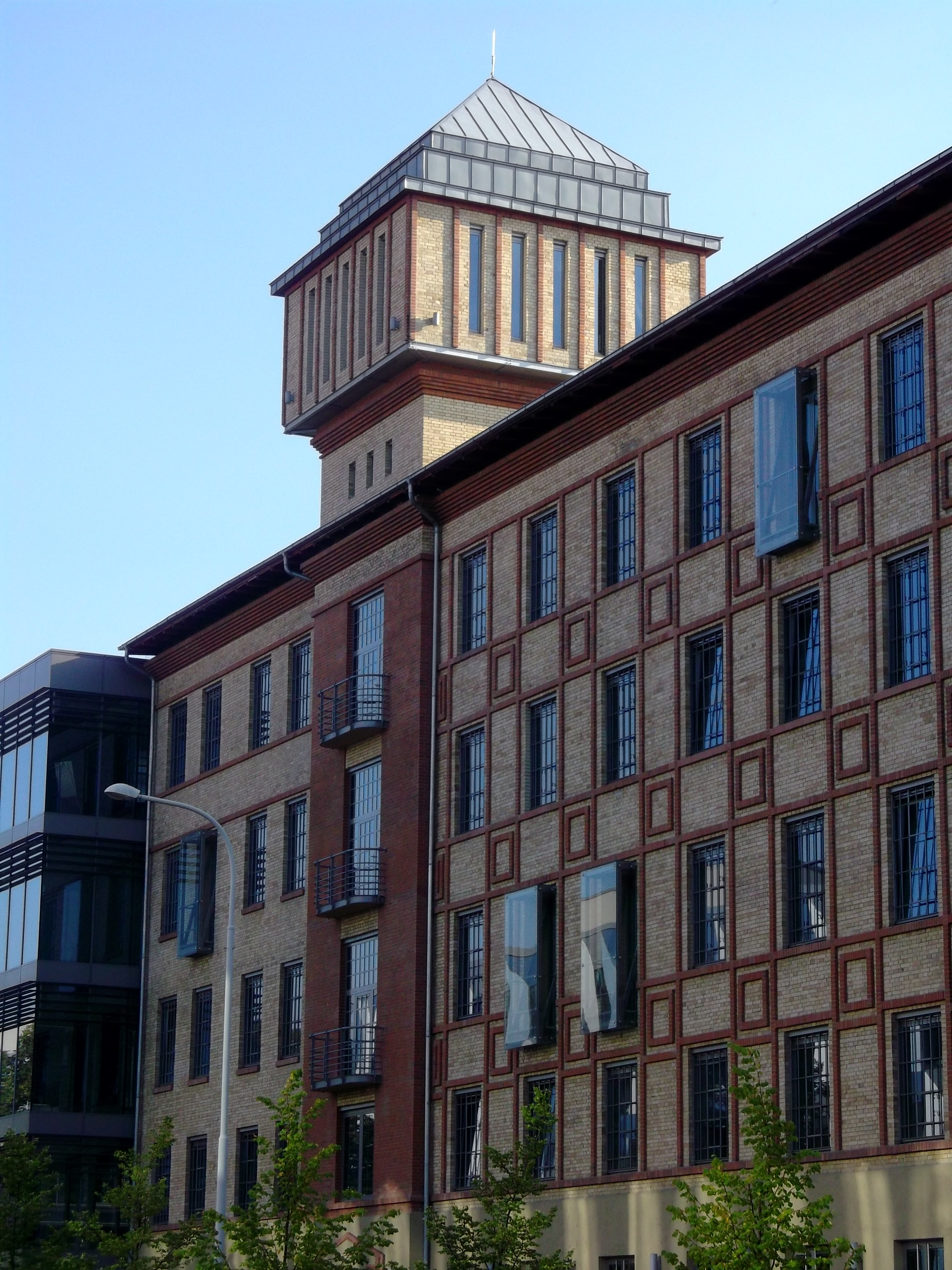 Akciový parní mlýn v Holešovicích, Praha 7-Holešovice, U Uranie, Na Maninách 1037/56, Jankovcova 1037/49, U parního mlýna 1037/1 - fasáda v ul. Jankovcova